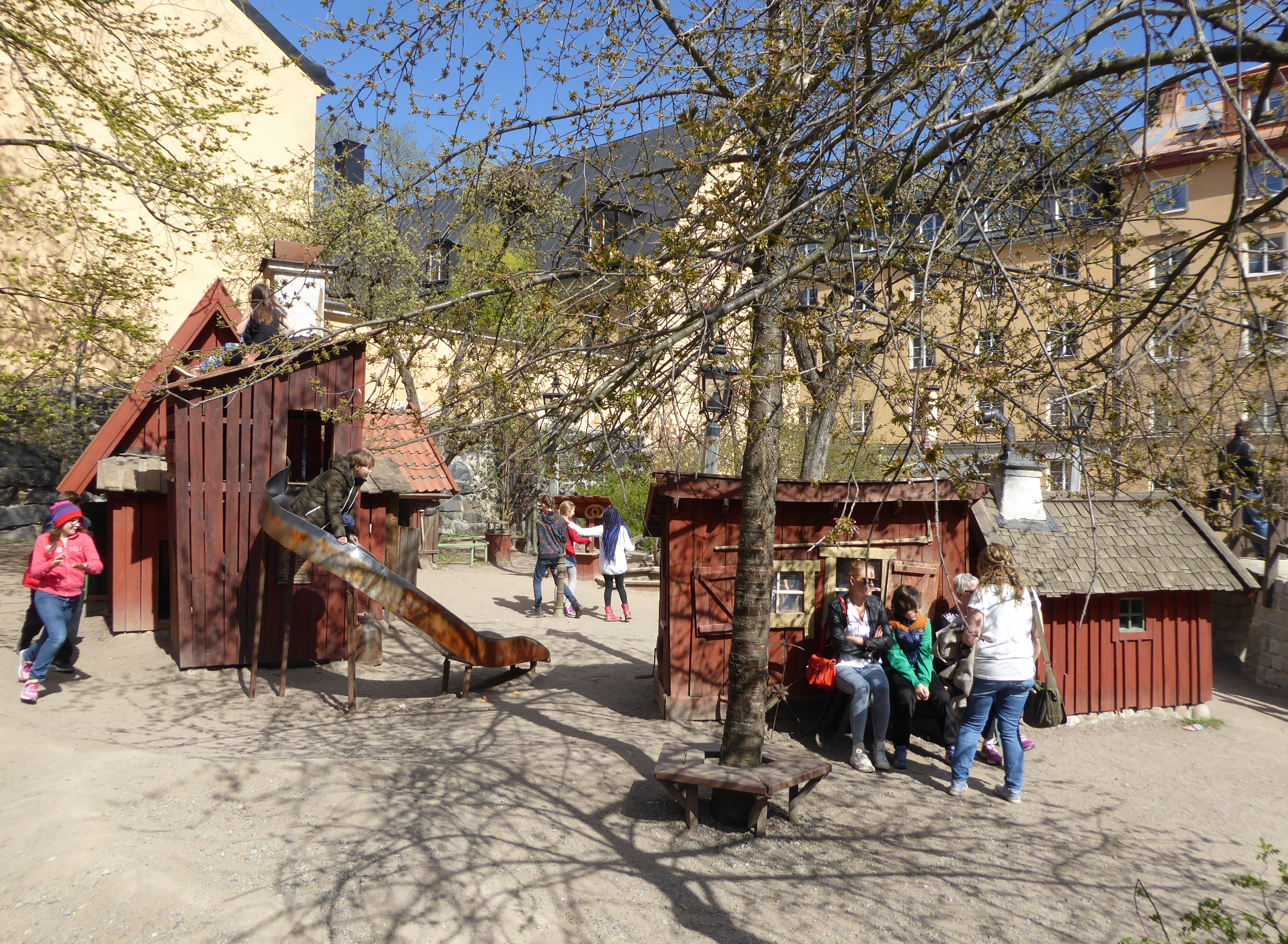 Bryggartäppan på Södermalm, temalekpark skapad av Tor Svae